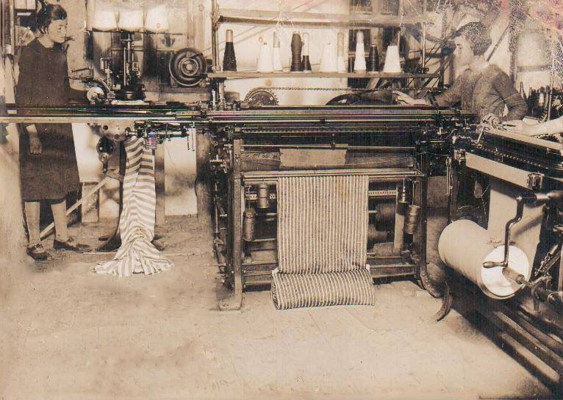 Vajza duke punuar ne fabriken e Trikotazhit ne Korce